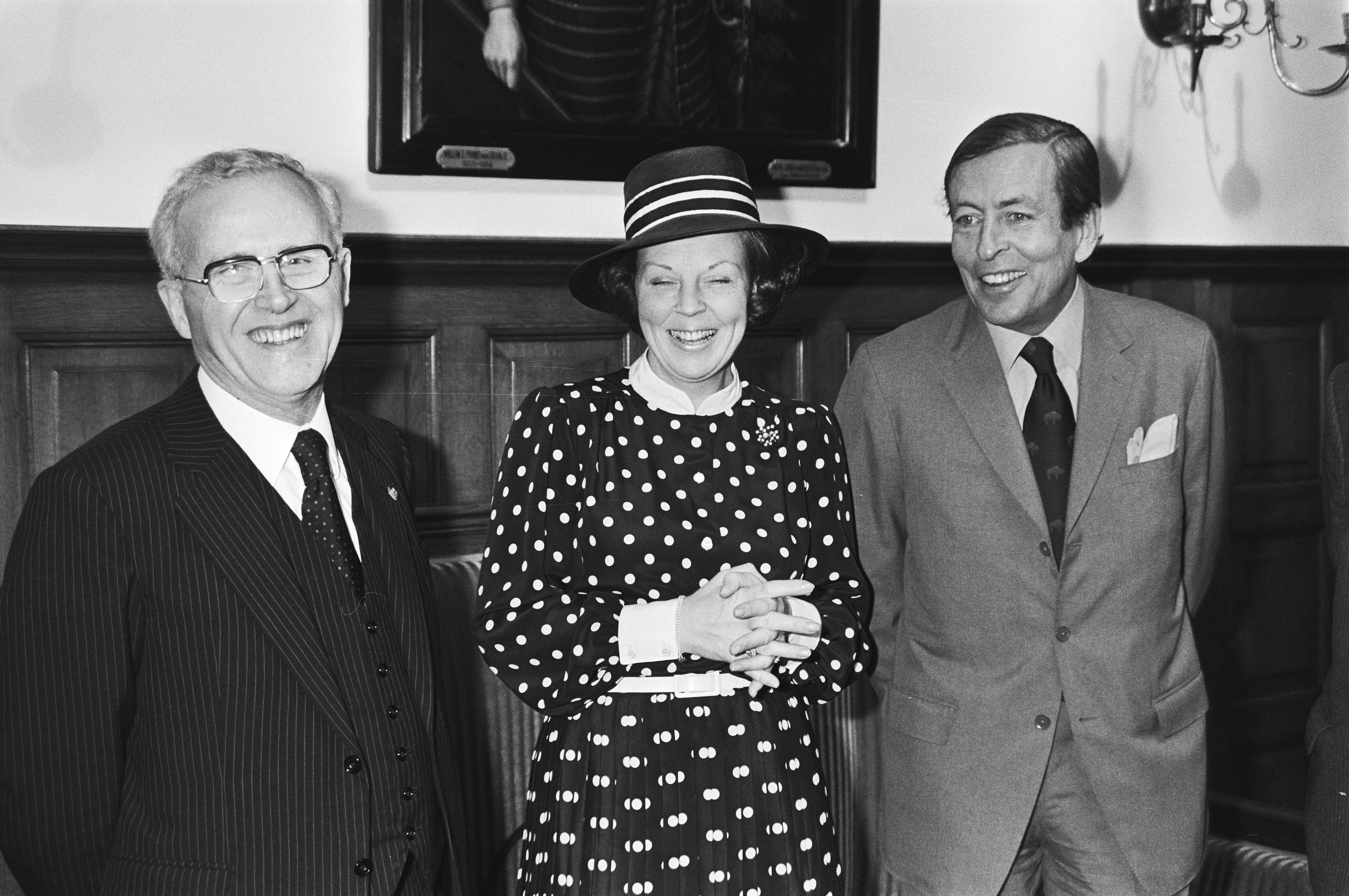 Collectie / Archief : Fotocollectie Anefo Reportage / Serie : [ onbekend ] Beschrijving : Koningin Beatrix brengt bezoek aan Eerste Kamer , 4 en Kamervoorzitter Thurlings , Koningin Beatrix en Prins Claus Datum : 7 april 1981 Trefwoorden : bezoeken Persoonsnaam : Beatrix, koningin, Claus, prins Fotograaf : Dijk, Hans van / Anefo Auteursrechthebbende : Nationaal Archief Materiaalsoort : Negatief (zwart/wit) Nummer archiefinventaris : bekijk toegang 2.24.01.05 Bestanddeelnummer : 931-4206